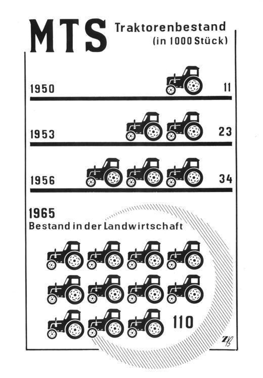 Infografik, Traktorenbestand der MTS Zentralbild Schulz Sch-Ho.9.3.1959 MTS-Traktorenbestand Ein starkes Ansteigen kennzeichnet den Traktorenbestand unserer Maschinen- und Traktoren-Stationen. 1949 gegründet - verfügten unsere MTS bereits 1950 über 10834 1953 über 23042 und 1956 über 33866 Traktoren Der Siebenjahrplan der sozialistischen Entwicklung in der Landwirtschaft sieht für 1965 einen Endbestand von ungefähr 110.000 Traktoren in der Landwirtschaft vor.